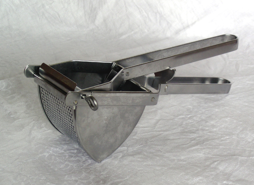 Potato ricer